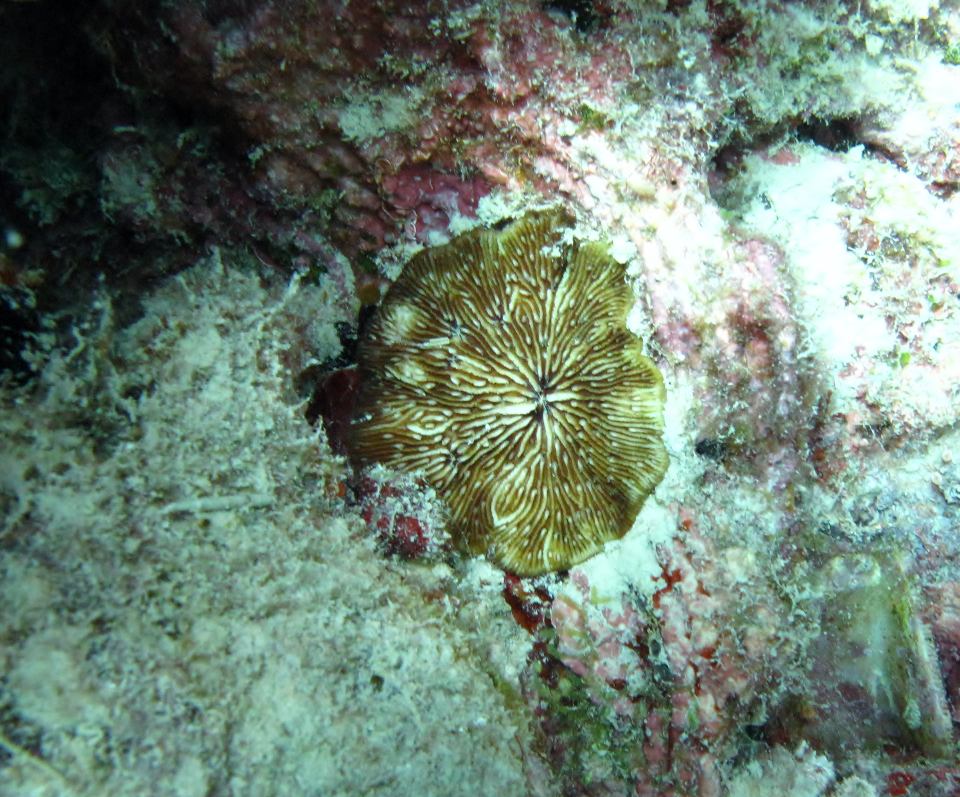 Cantharellus jebbi en isla Erub, Estrecho de Torres, Australia